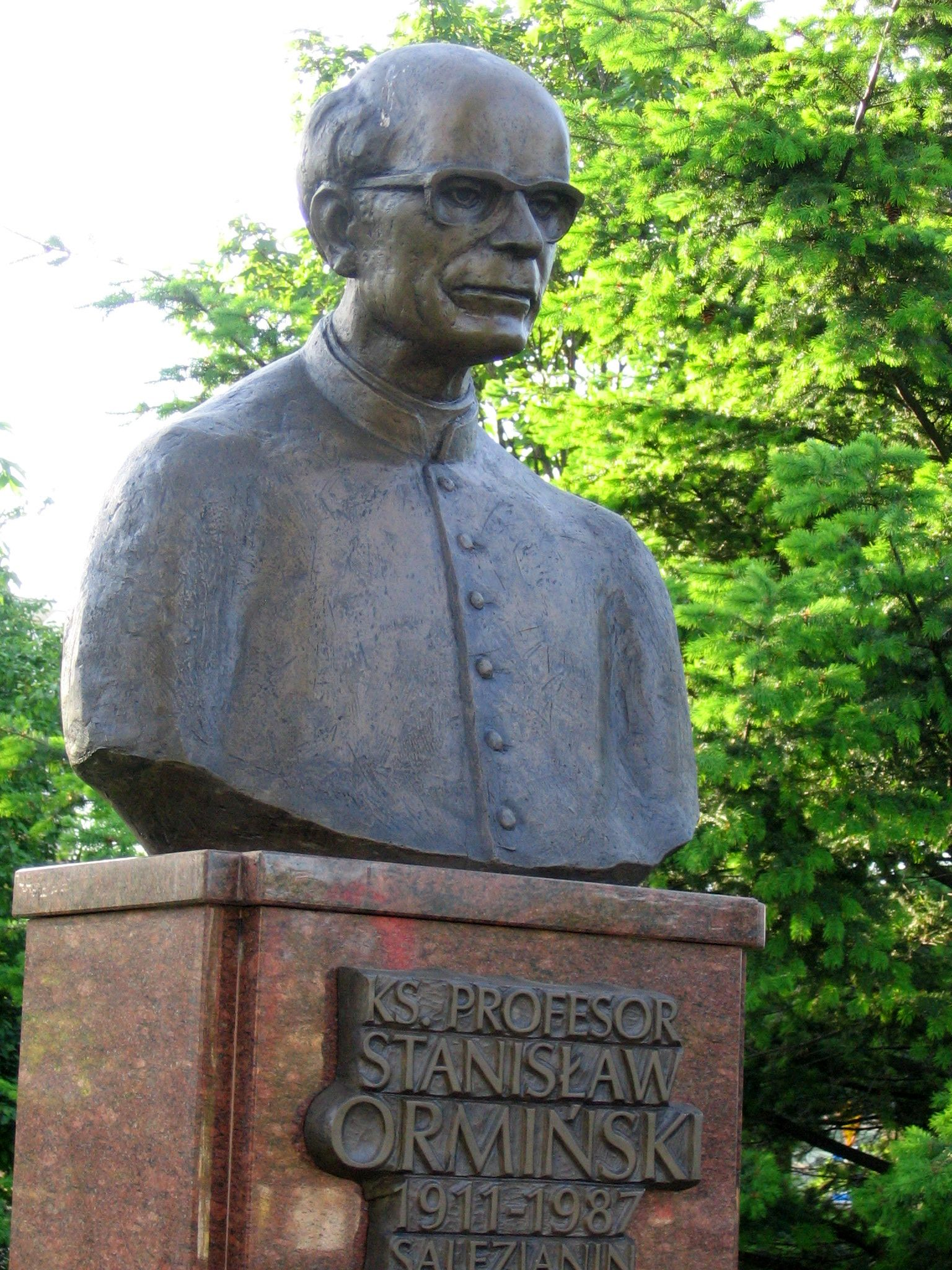 Pomnik księdza Stanisława Ormińskiego w Rumi